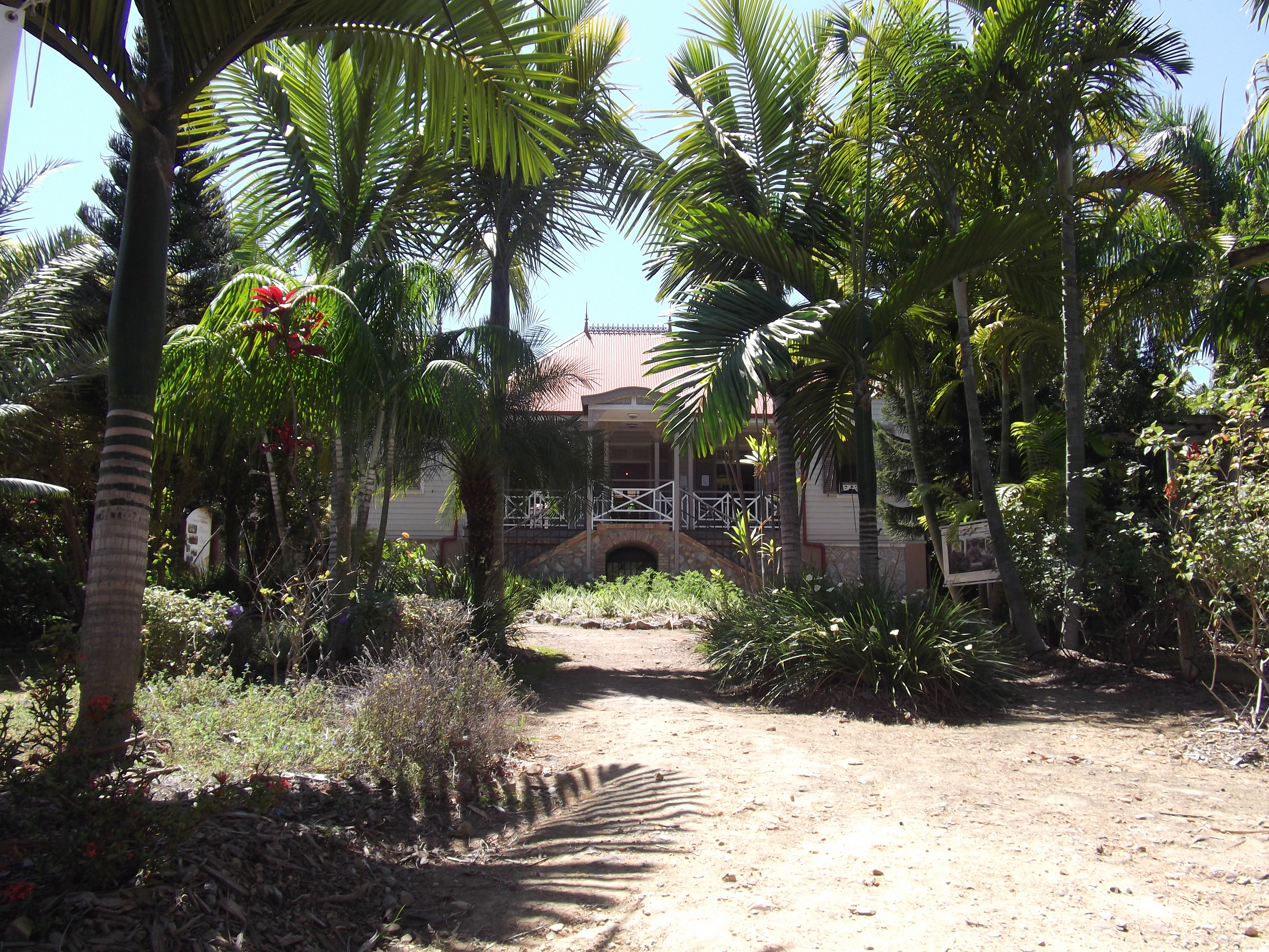 La maison Célières, Faubourg Blanchot, Nouméa, Nouvelle-Calédonie